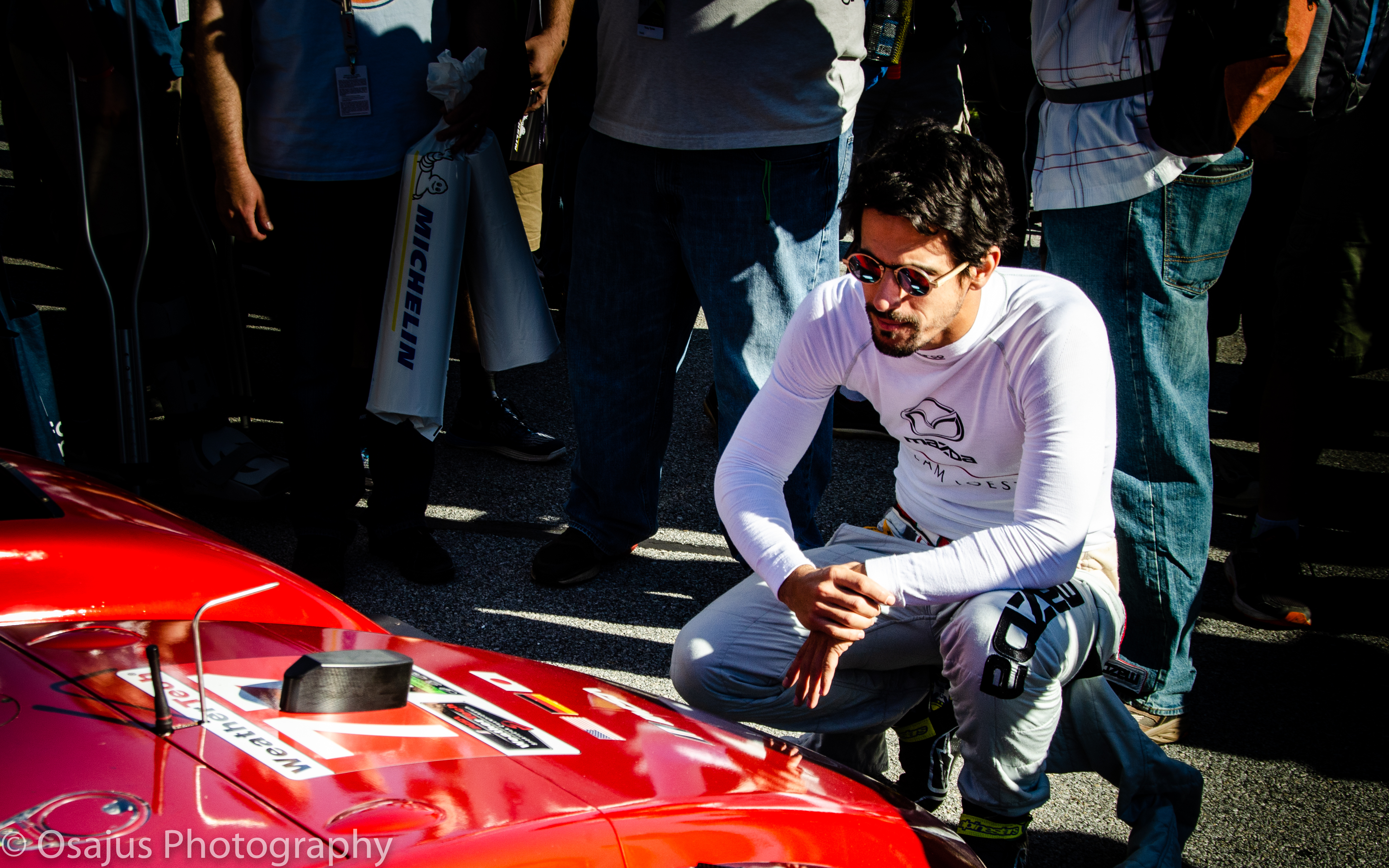 2018 Petit Le Mans